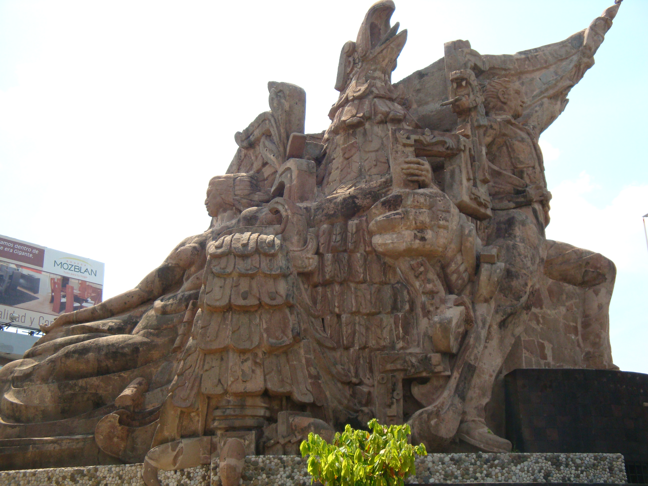 Fachada principal del munumento al Coronel Andrés Sánchez Magallanes, en la ciudad de Villahermosa, Tabasco, México. Existe otro achivo con la foto de la fachada posterior.